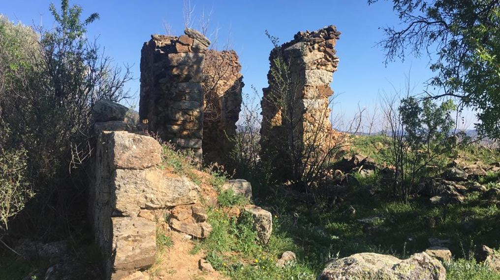 Ruinas del antiguo convento de los franciscanos descalzos llamado 'Dulce nombre de Jesús' ubicado en la localidad abulense de Cebreros. Aparece el ábside de una iglesia que se encontraba incorporada dentro del convento.